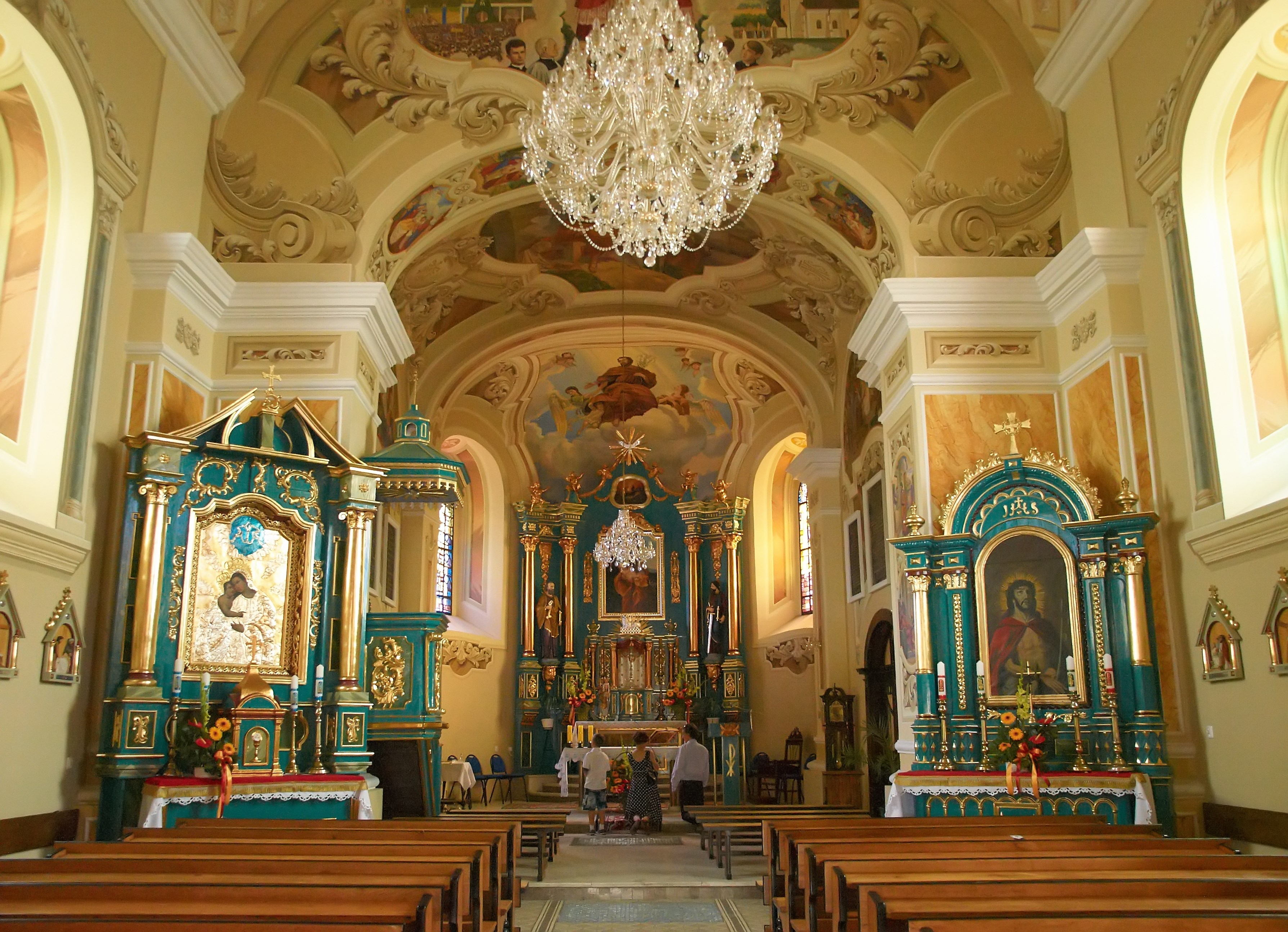 Lipinki, kościół par. p.w. Wniebowzięcia NMP, 1782